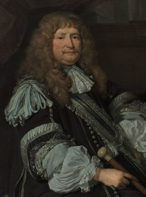 Portrait of Jan van Amstel (1618-1669), detail.